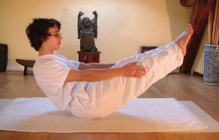 Yoga postures Navasana